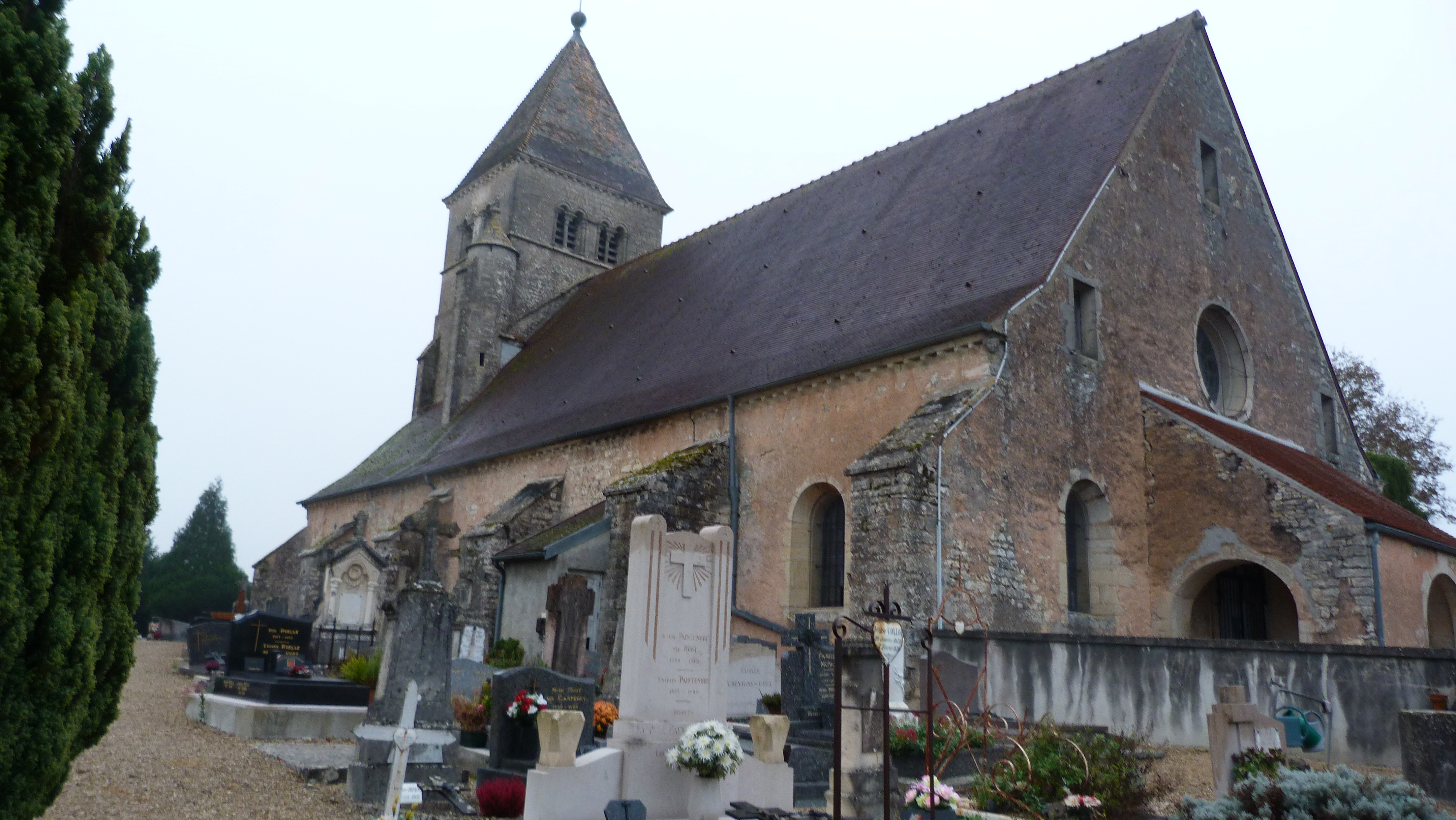 Preĝejo de Renève